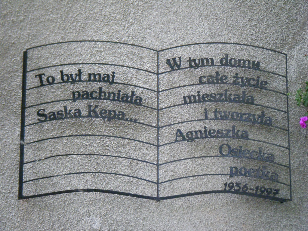 Tablica upamiętniająca Agnieszkę Osiecką. Warszawa, Saska Kępa, ul. Dąbrowiecka 25.